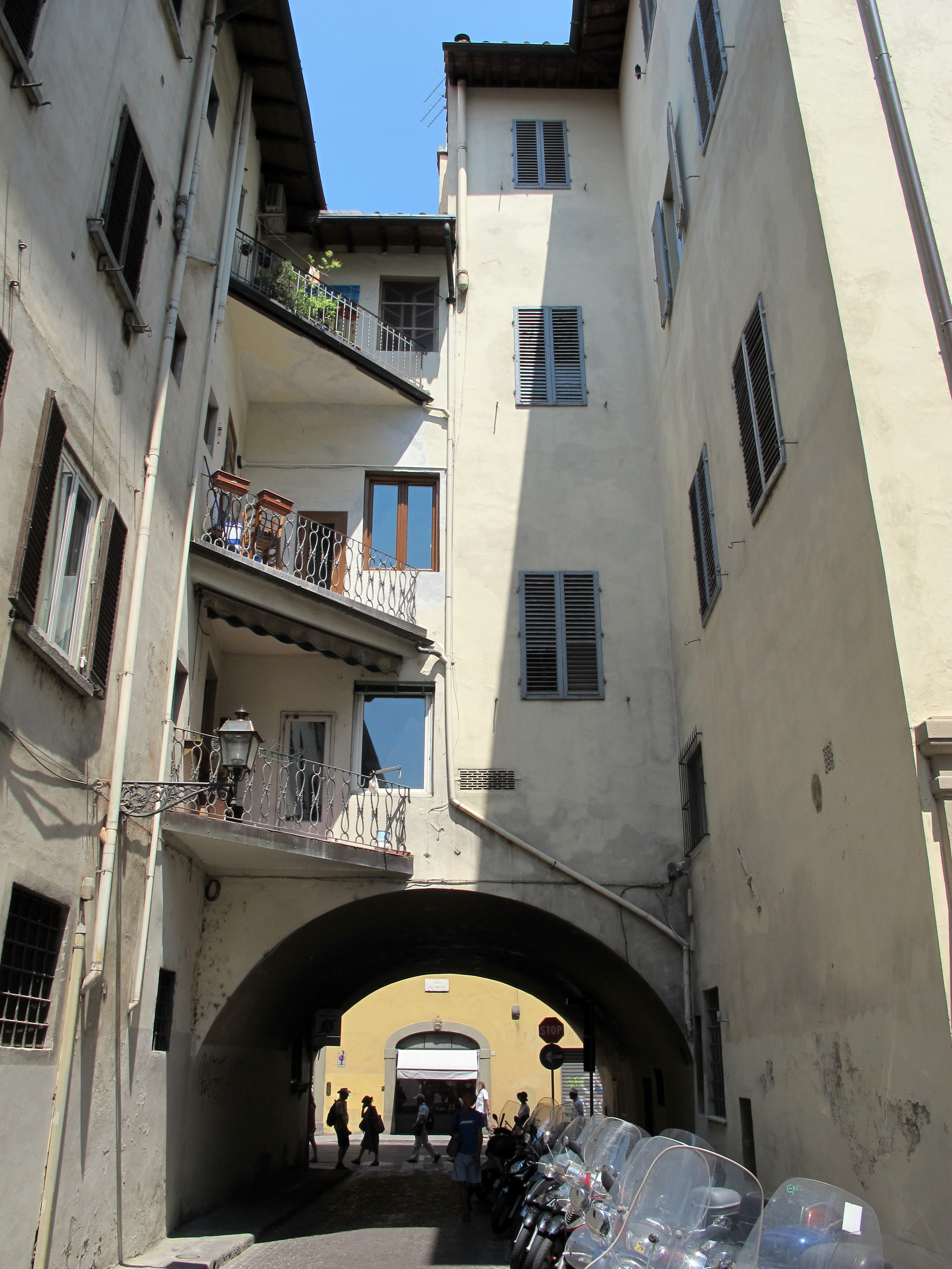 Volta dei tintori, veduta